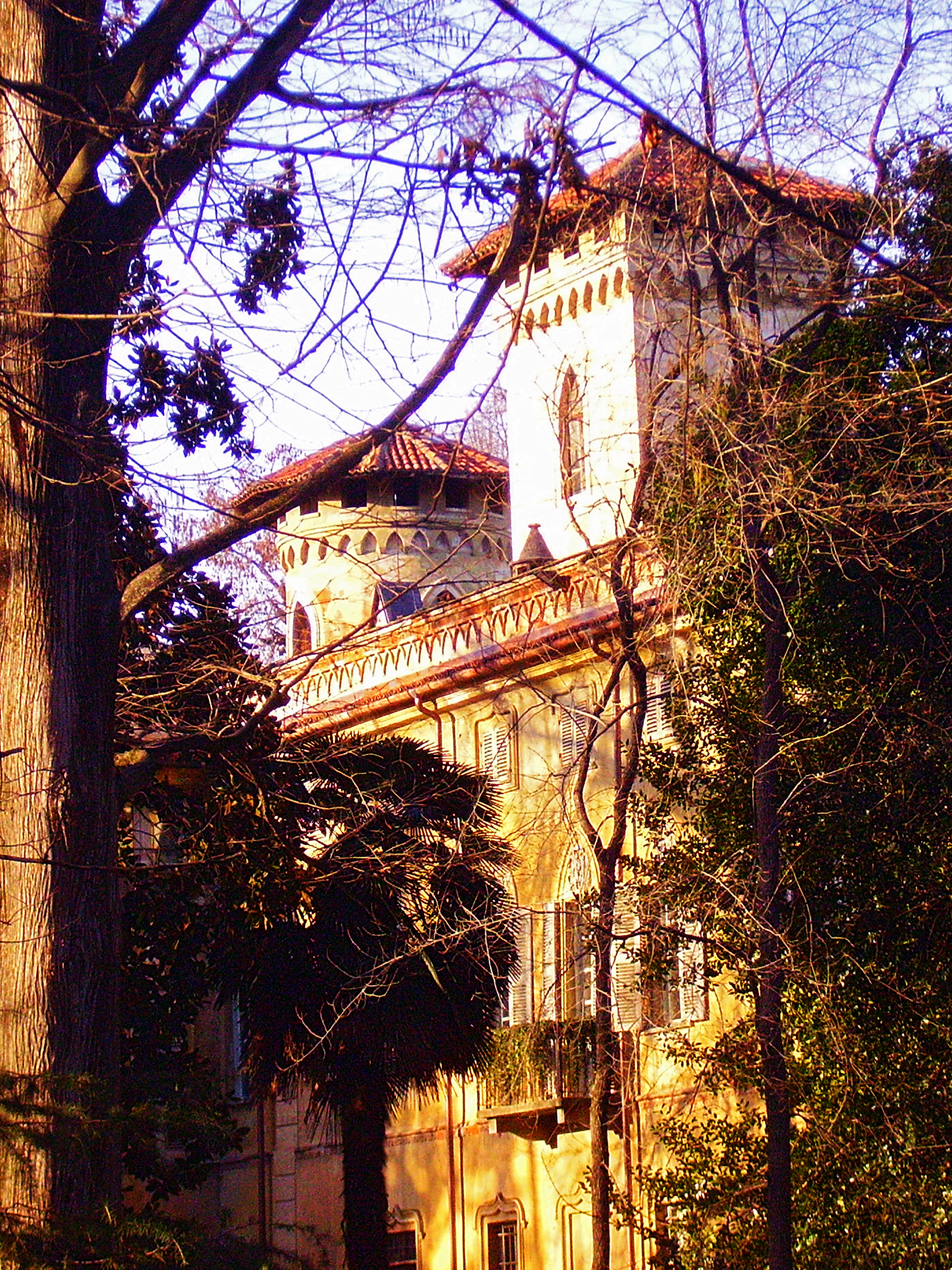 Castello di Miradolo, San Secondo di Pinerolo, Torino, Italia